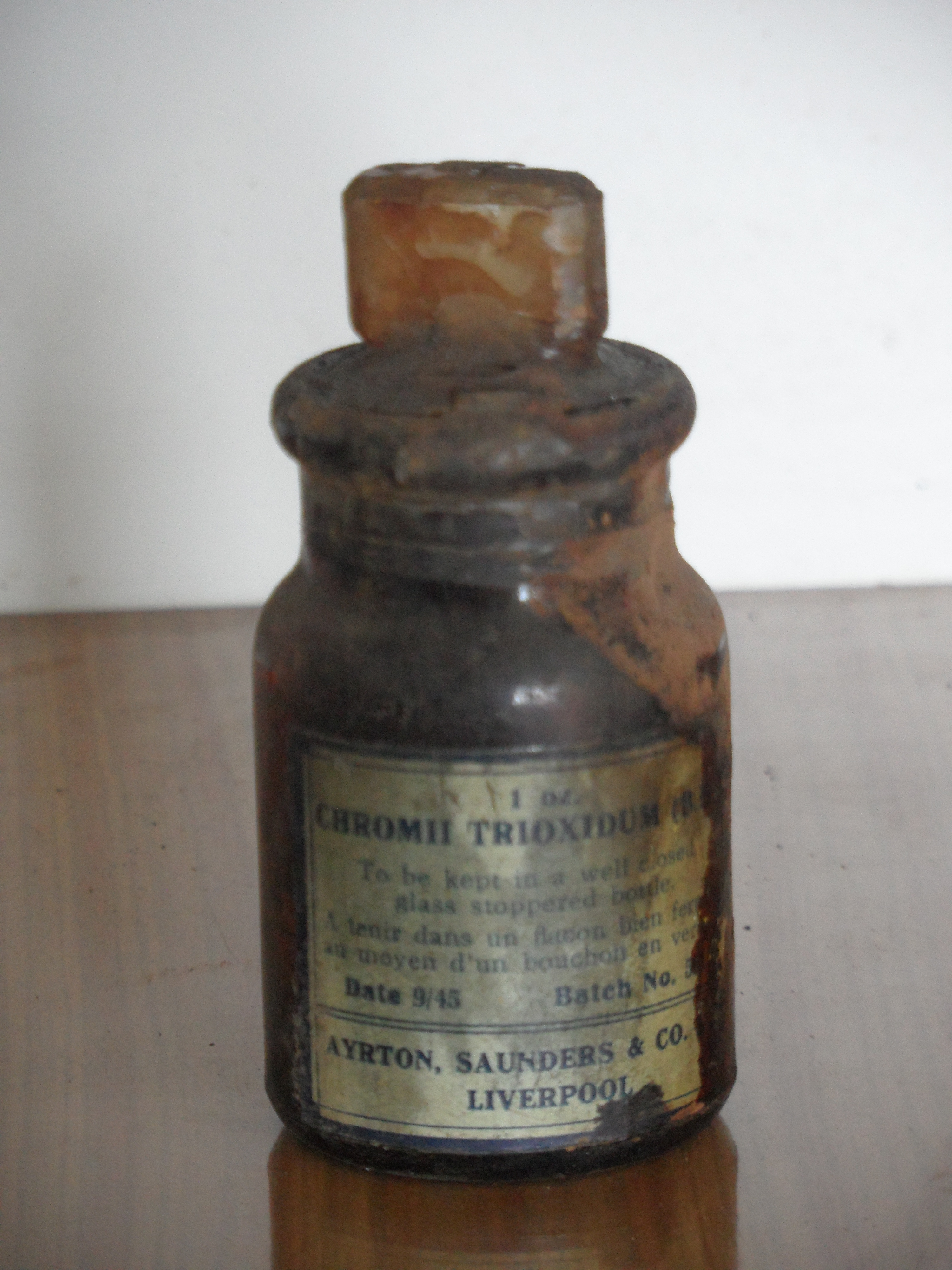 Trójtlenek chromu (bezwodnik kwasu chromowego), Wielka Brytania, 1945